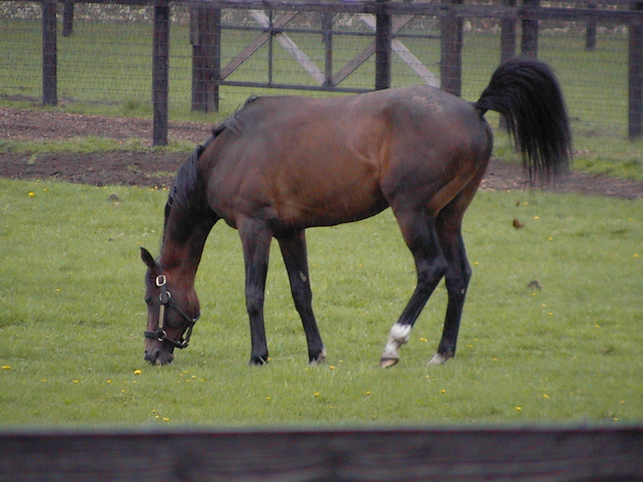 社台ファームの牧場見学にて撮影。